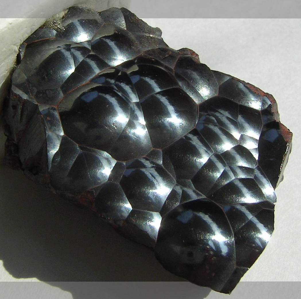 Сферолитовая корка Гематита (так называемая "красная стекляная голова")